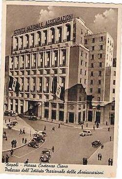 "Napoli - Piazza Costanzo Ciano. Palazzo dell' Istituto Nazionale delle Assicurazioni" (oggi Piazza Carità). Cartolina. Autore sconosciuto.